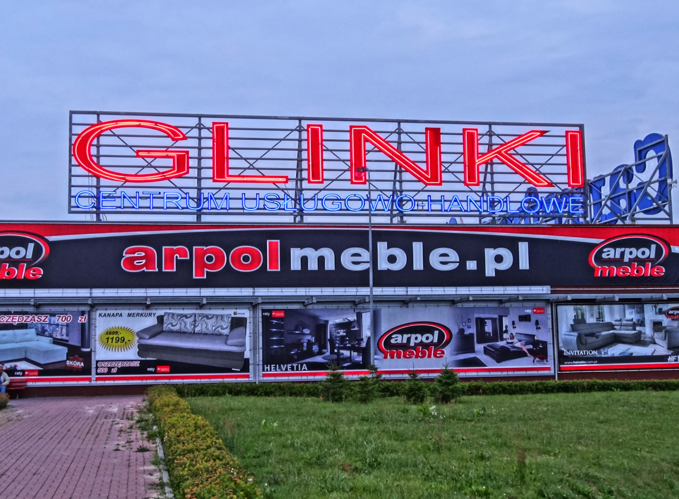 Centrum handlowe Glinki w Bydgoszczy przy al. Jana Pawła II